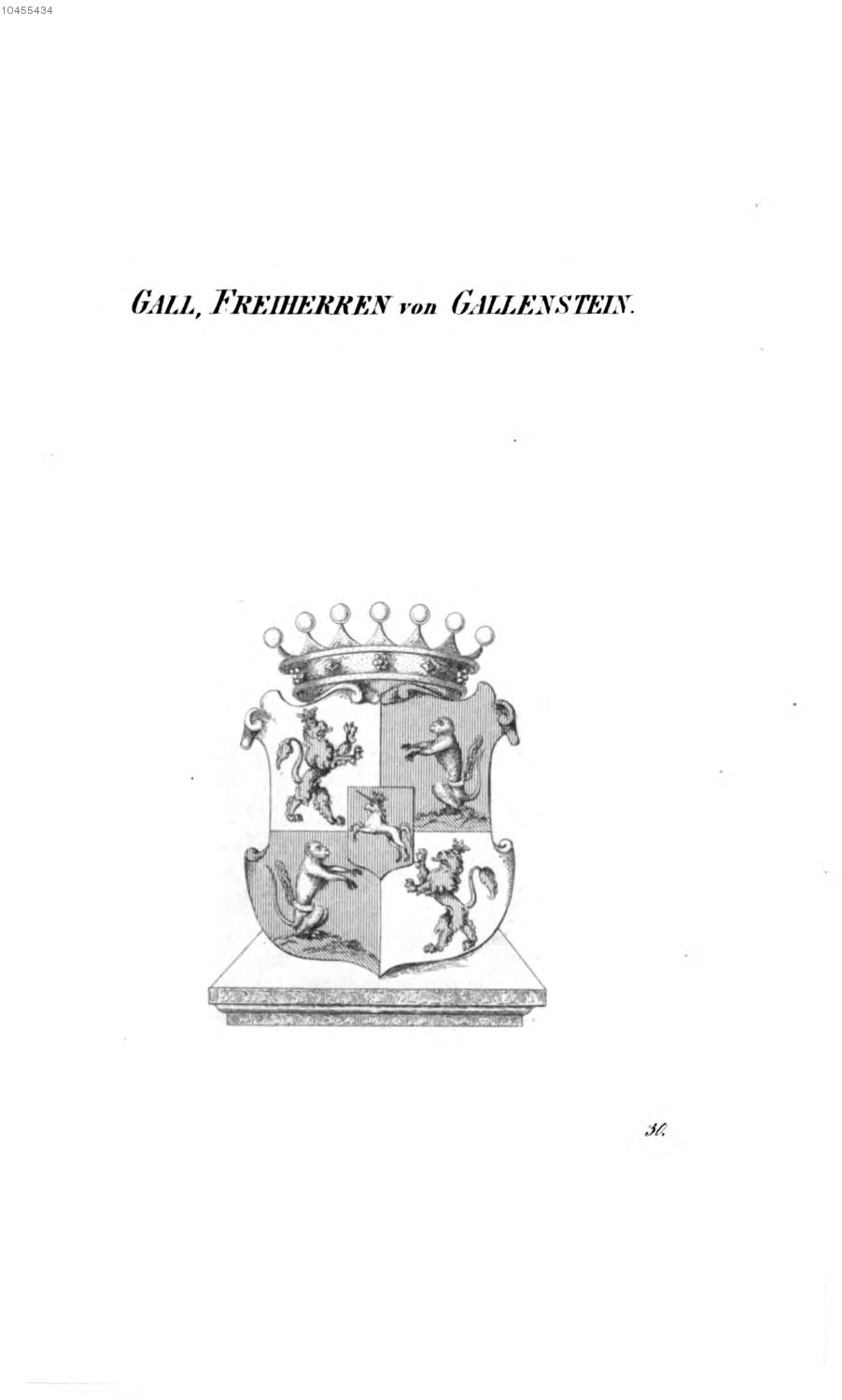 Wappen Gall von Gallenstein 2 - Tyroff AT.jpg